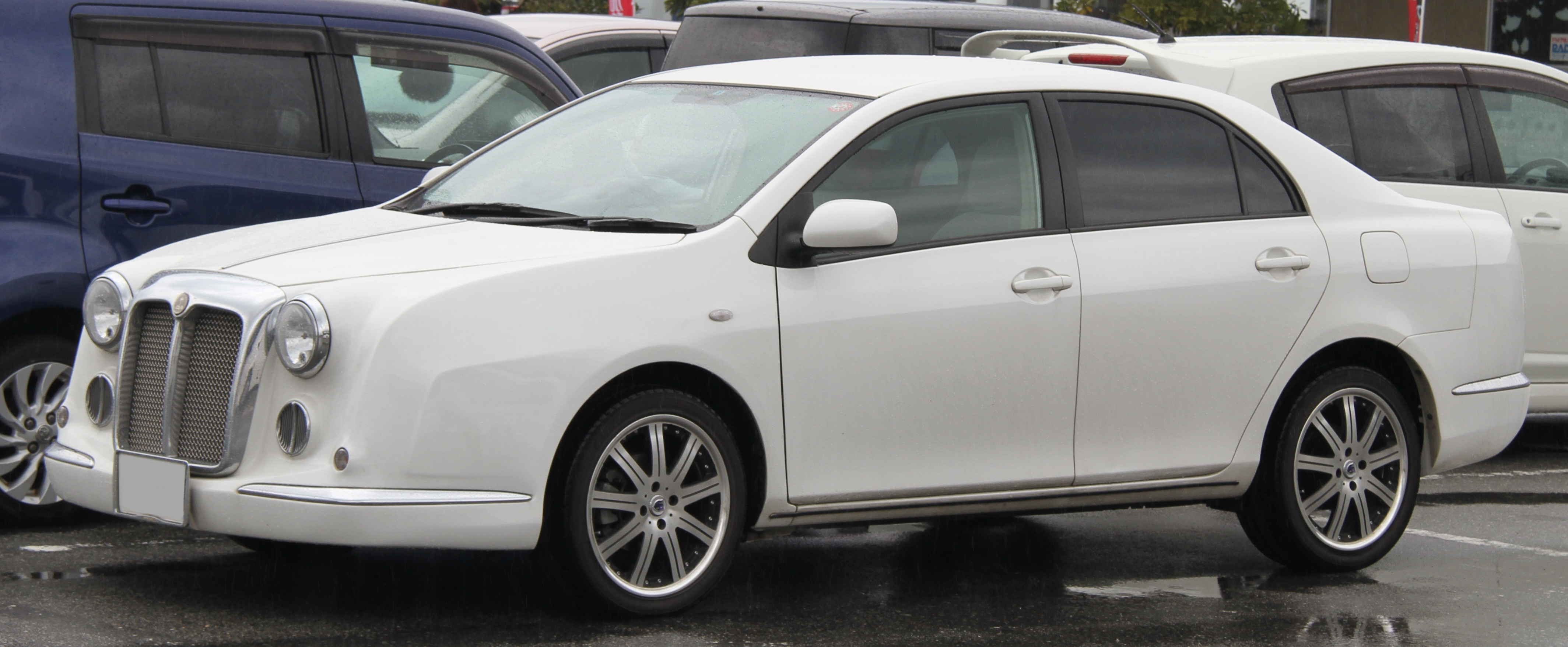 Mitsuoka Galue 2-04